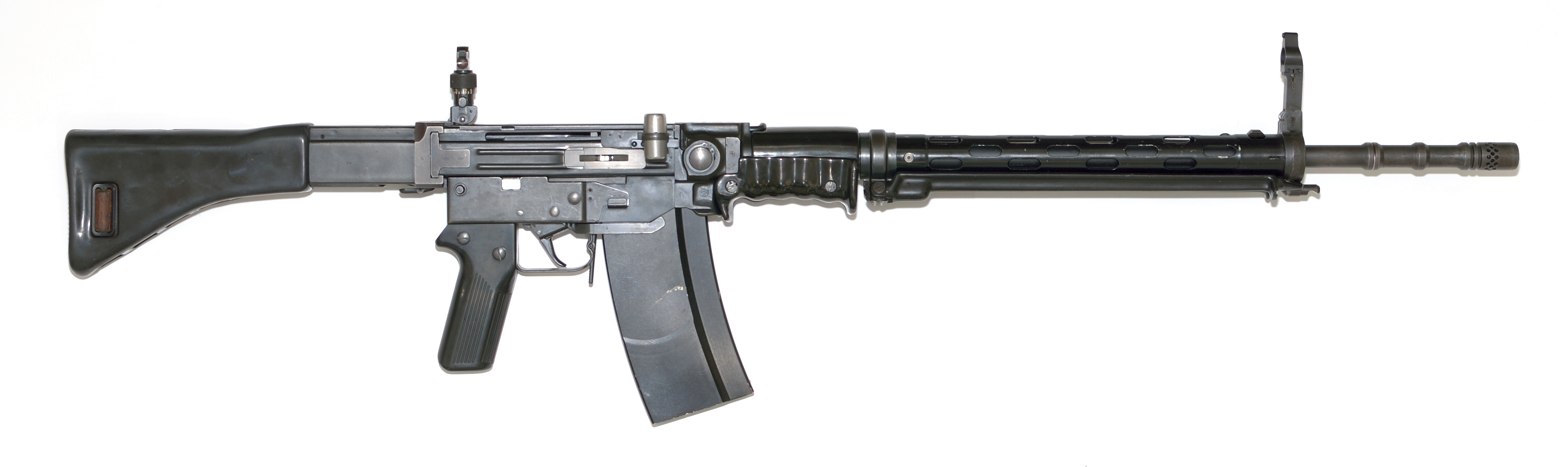 Fusil d'assaut 57